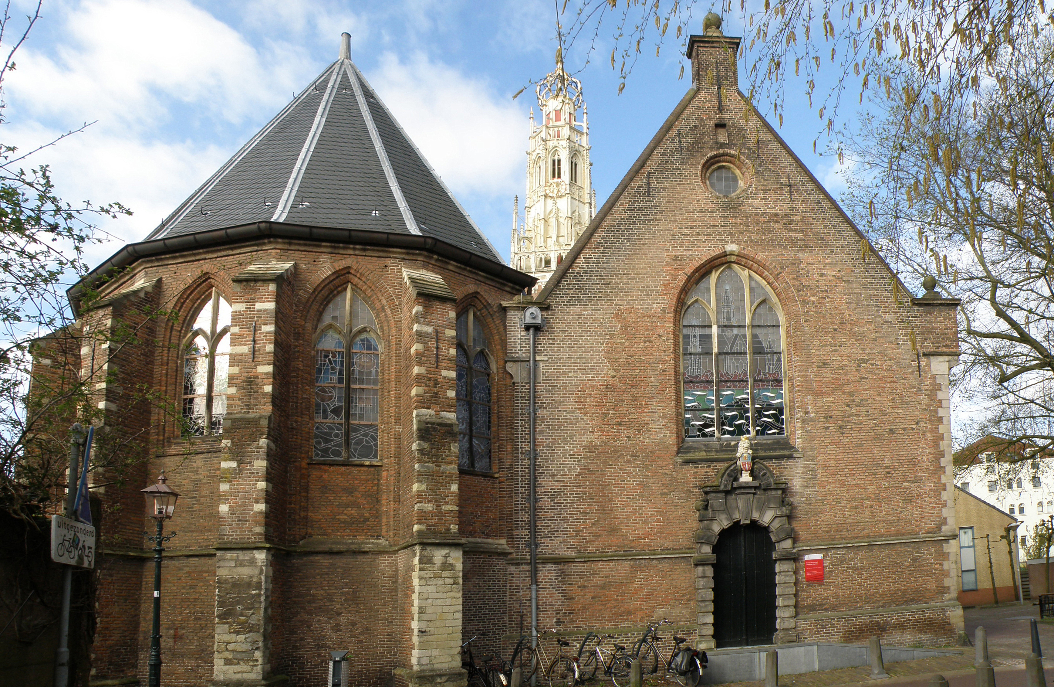 Haarlem, Nederland. Bakenesserkerk, koor (oostzijde), met rechts poort uit 1620.